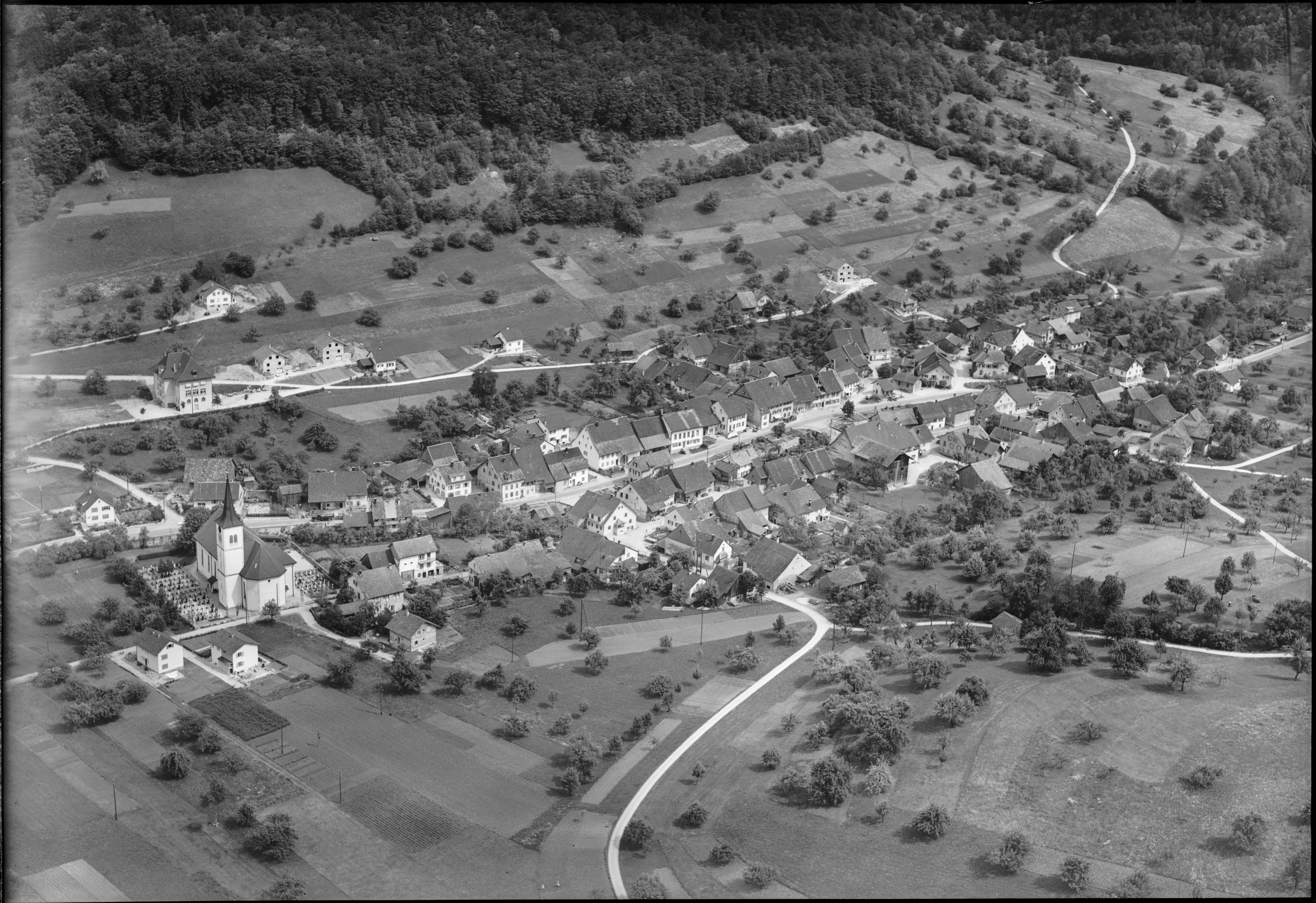 Tiefgeflogen